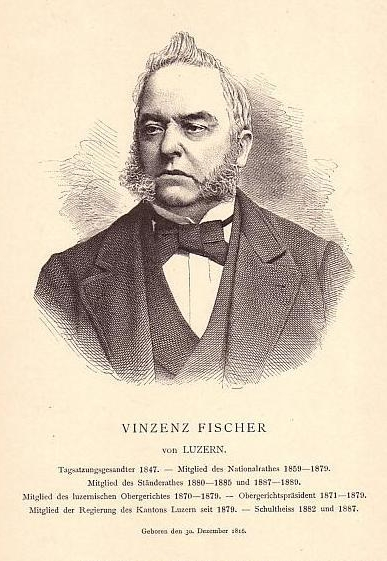 Stich - Der Schweizer Jurist und Politiker Vinzenz Fischer (1816–1896)